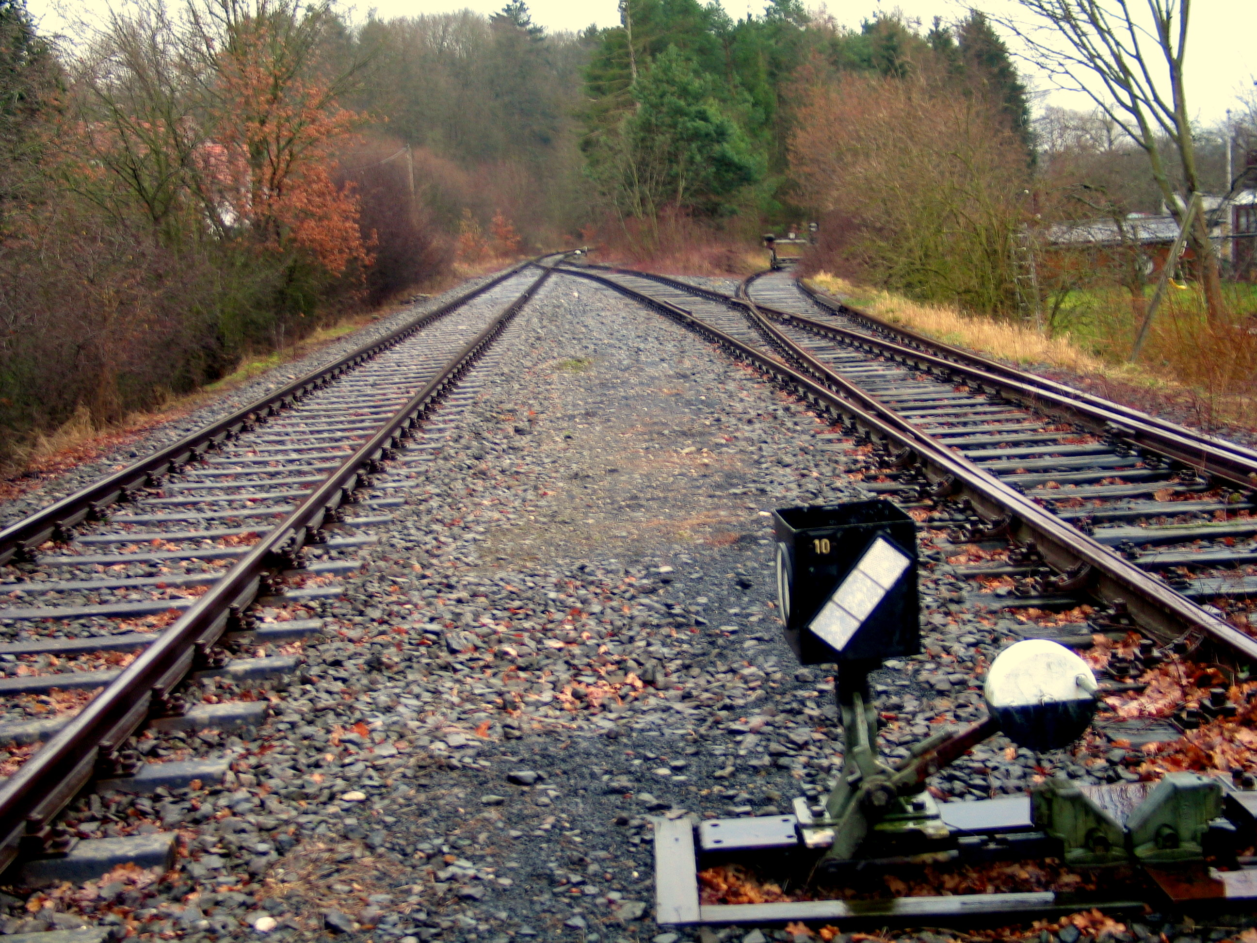 Ehemaliger Abzweig nach Ebrach an der Bahnstrecke Strullendorf-Frensdorf-Schlüsselfeld kurz hinter Frensdorf